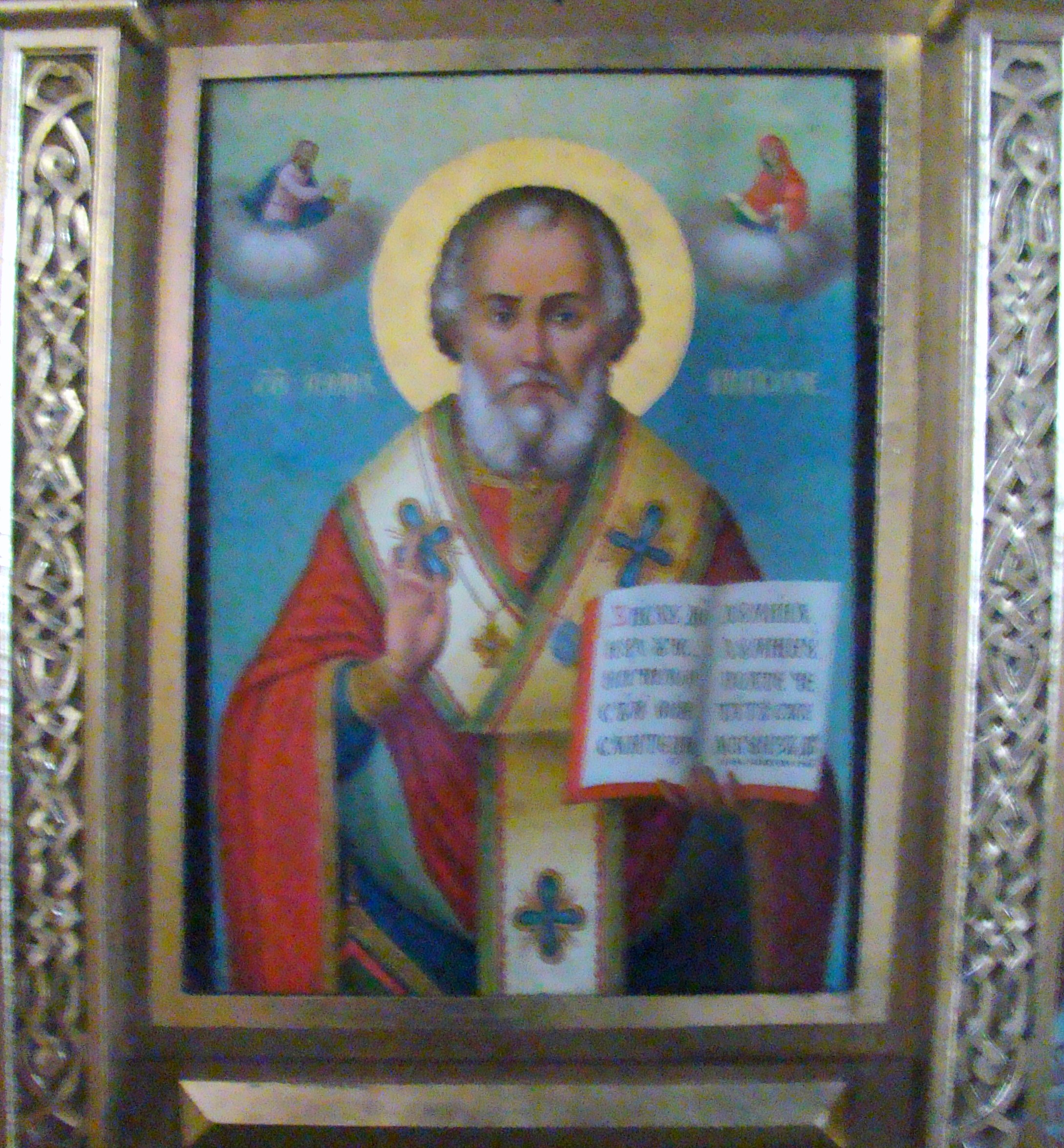 Biserica "Sfânta Maria" din Bungard, județul Sibiu 01